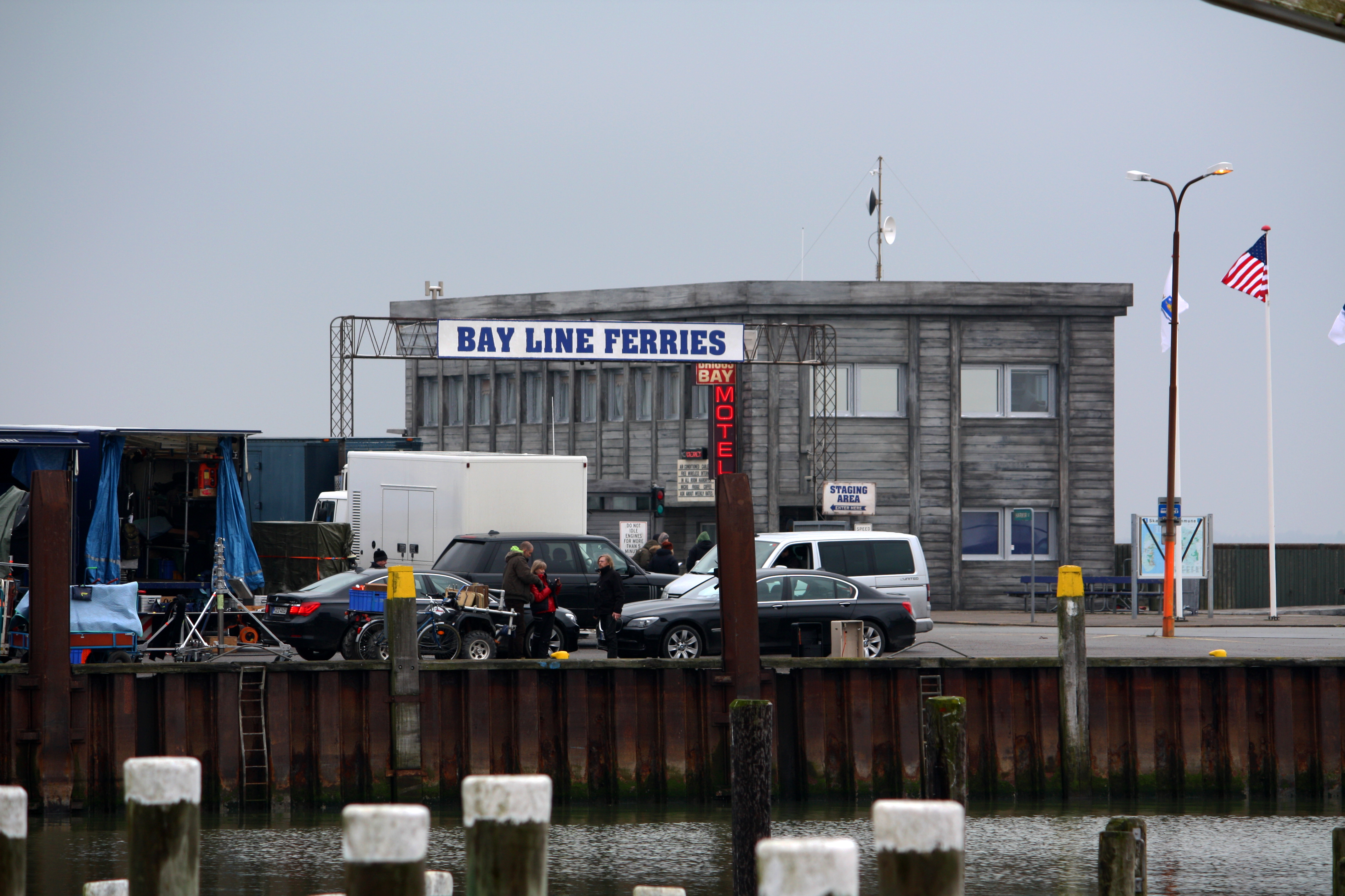 SETPHOTO: Havneby auf (Römö, Dänemark) als Drehort für den Polanski-Kinofilm "The Ghostwriter". Das Bild zeigt das Motel im Film, in dem sich Ewan McGregor nach einer Verfolgungsjagd durch Auftragskiller verschanzt. Tatsächlich gehört das Gebäude zum Fährterminal.